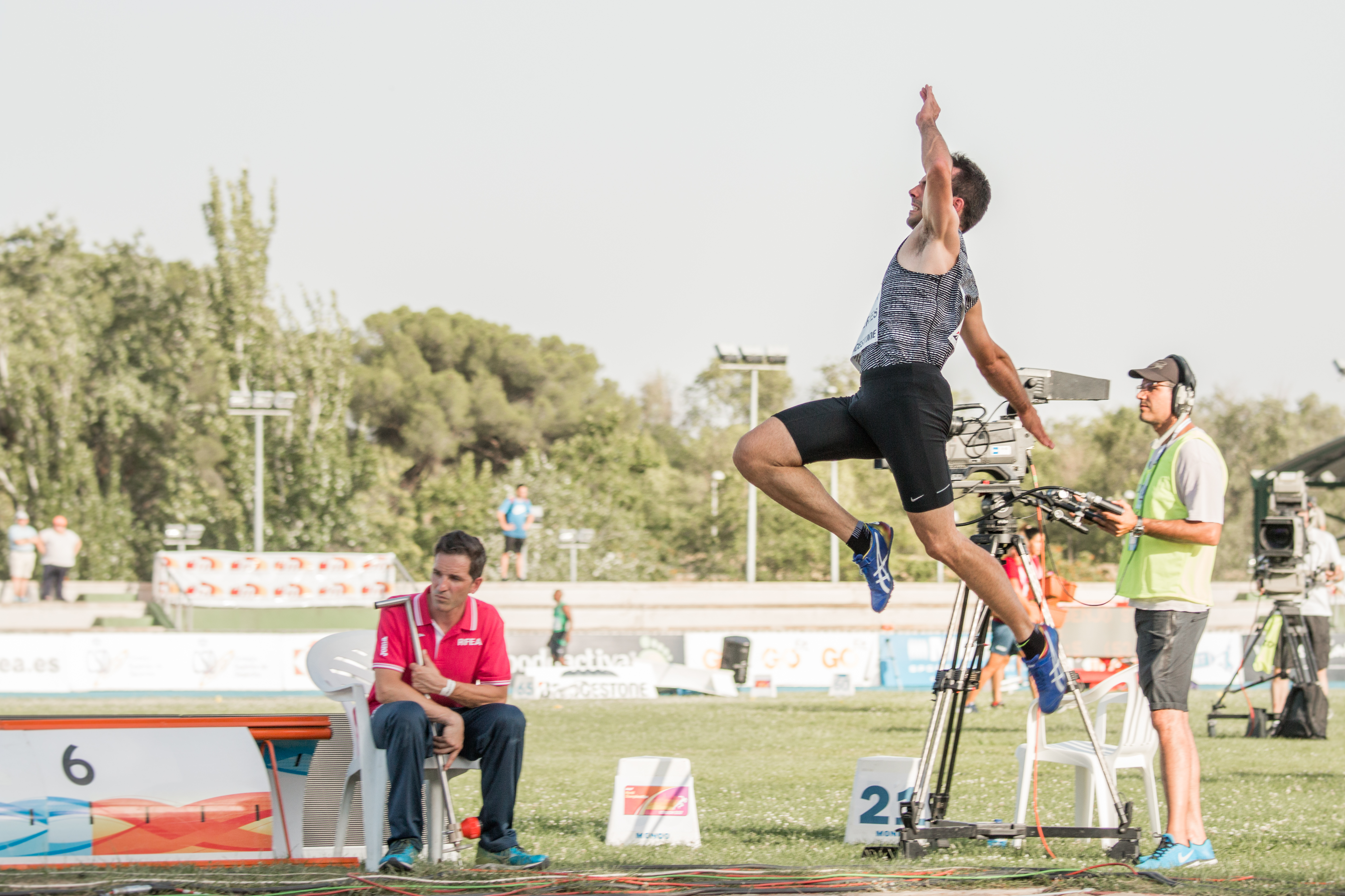 Eusebio Cáceres (ESP). Salto en largo. IAAF World Challenge. Meeting Madrid 2017. Moratalaz, Madrid.